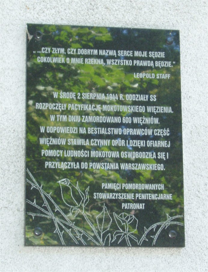 przy ul. Rakowieckiej 37 a w Warszawie (fot Zu)